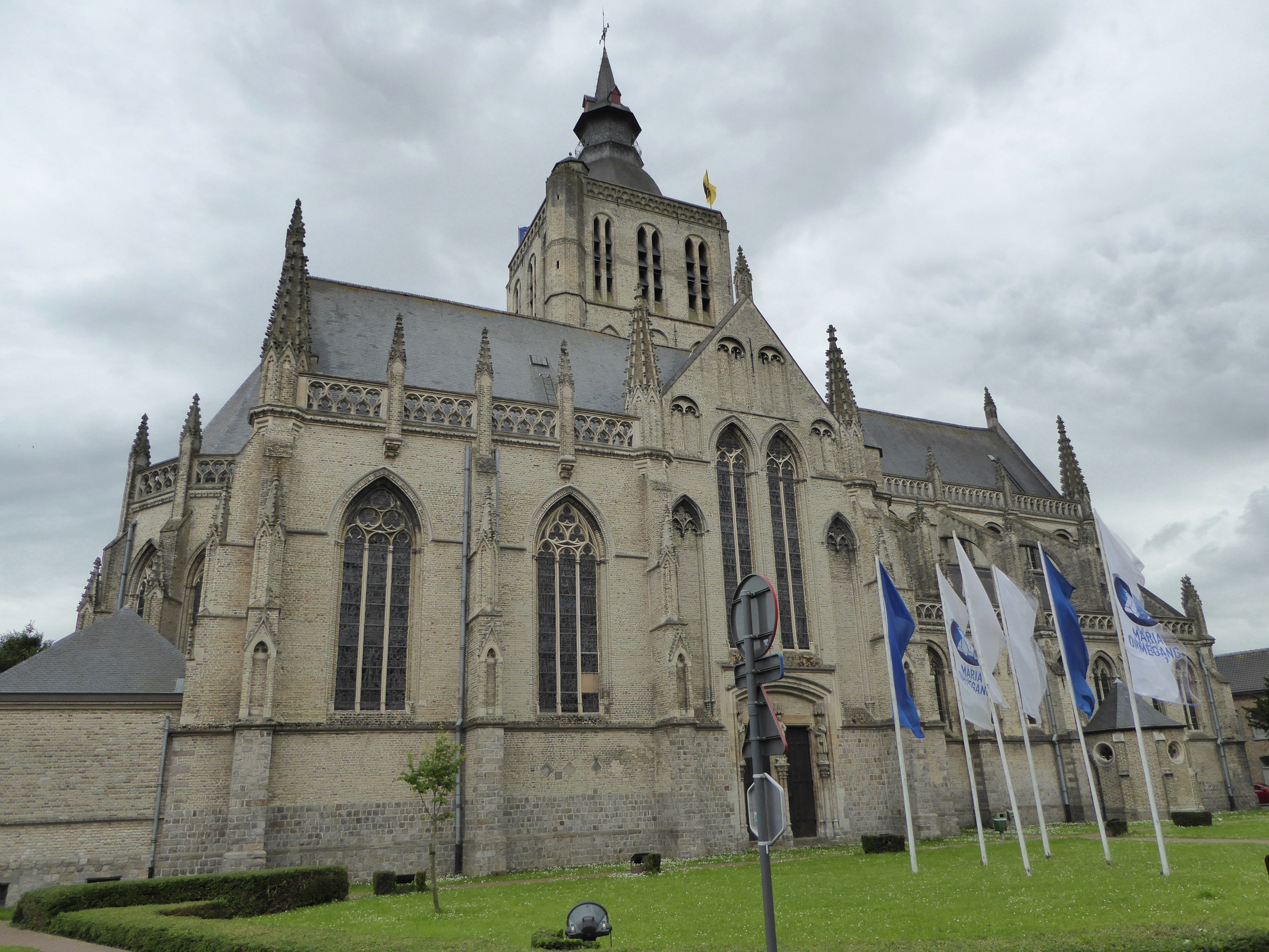 Hallkerque Sint-Janskerk Poperinge Province de Flandre-Occidentale Belgique